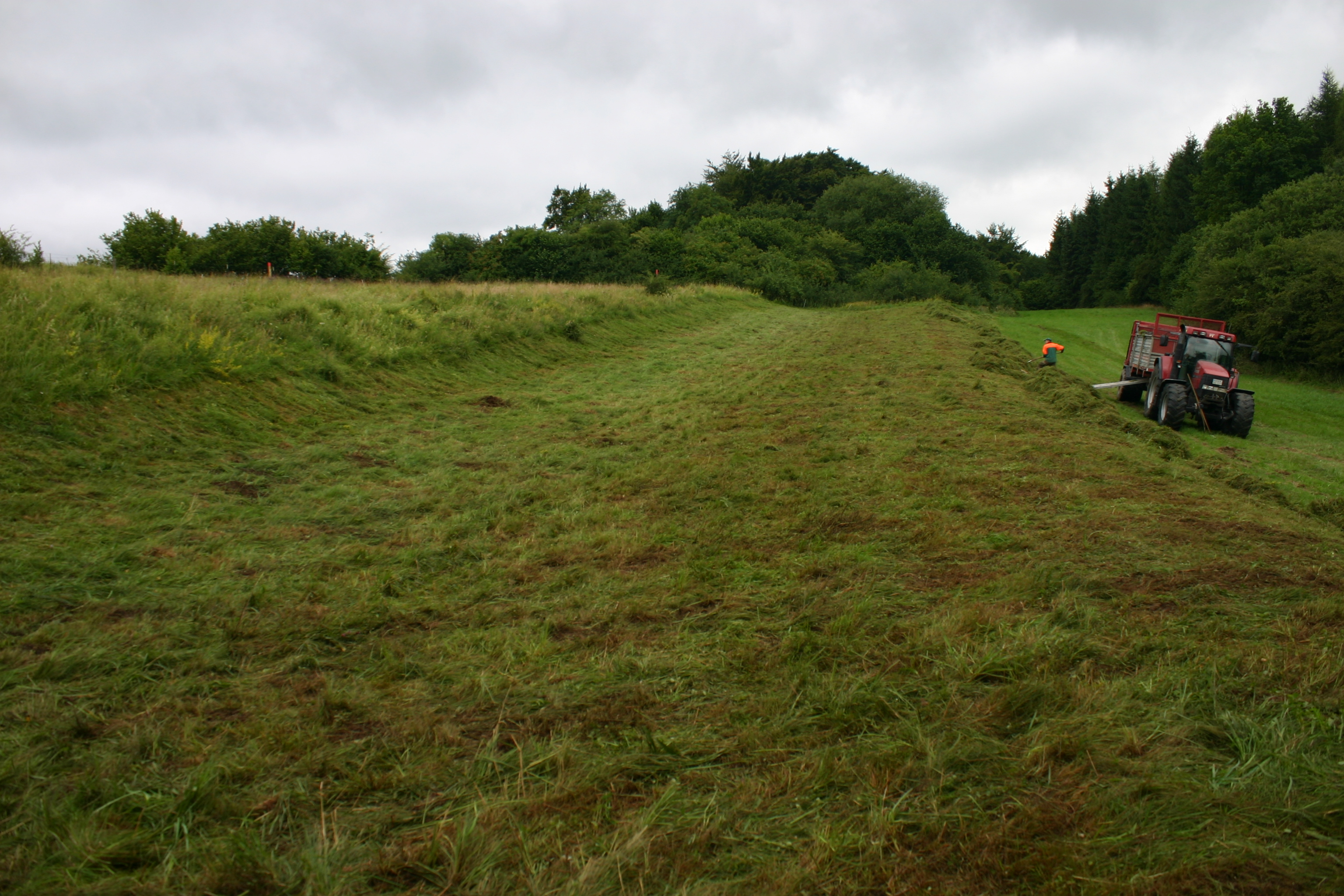 Vom Landschaftspflegetrupp der Biologischen Station Hochsauerlandkreis gemähter Bereich am Nordwestrand des NSG Burhagen. Der Bereich, auch ein gesetzlich geschütztes Biotop und teil des FFH-Gebietes, wurde im Frühjahr 2017 bei Steinbrucherweiterung, mit Genehmigung der Unteren Naturschutzbehörde HSK, zerstört.